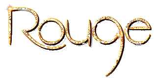 Rouge logo oficial